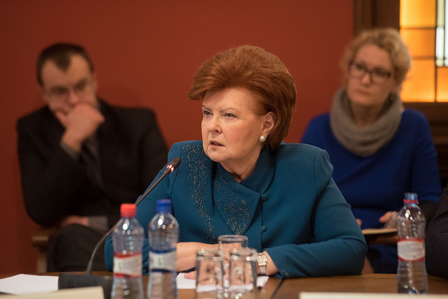 Vaira Vīķe-Freiberga 2016.gada 23.februāra sēdē